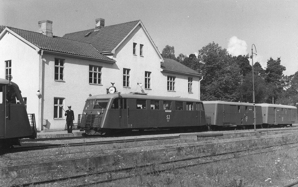 Två rälsbusståg möts vid Roma station på 1950-talet. Ett av tågen får avgångssignal av tågklareraren.